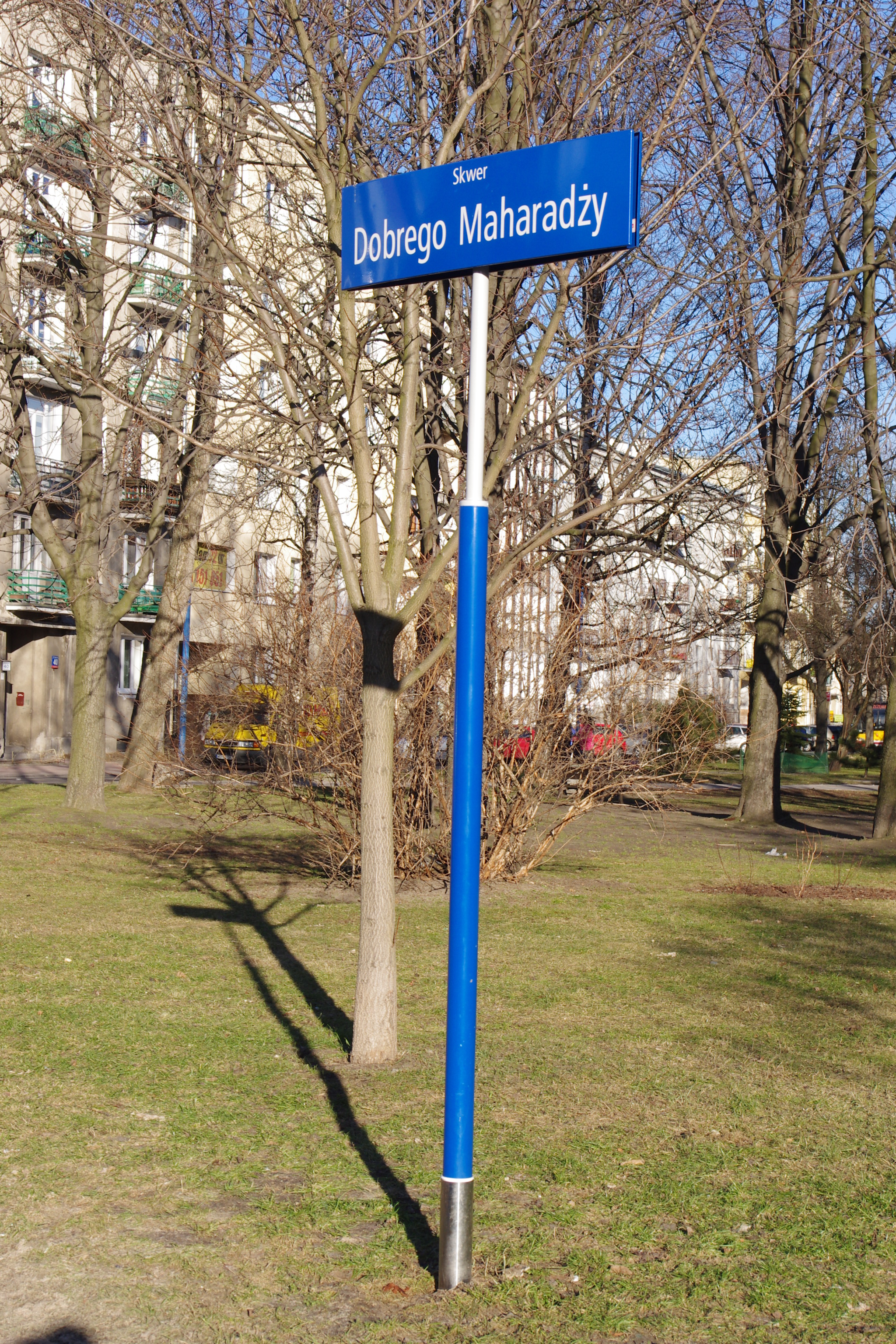 Element Miejskiego Systemu Informacji (MSI), słupek z tablicą: Skwer Dobrego Maharadży (Digvijaysinhji) na warszawskiej Ochocie